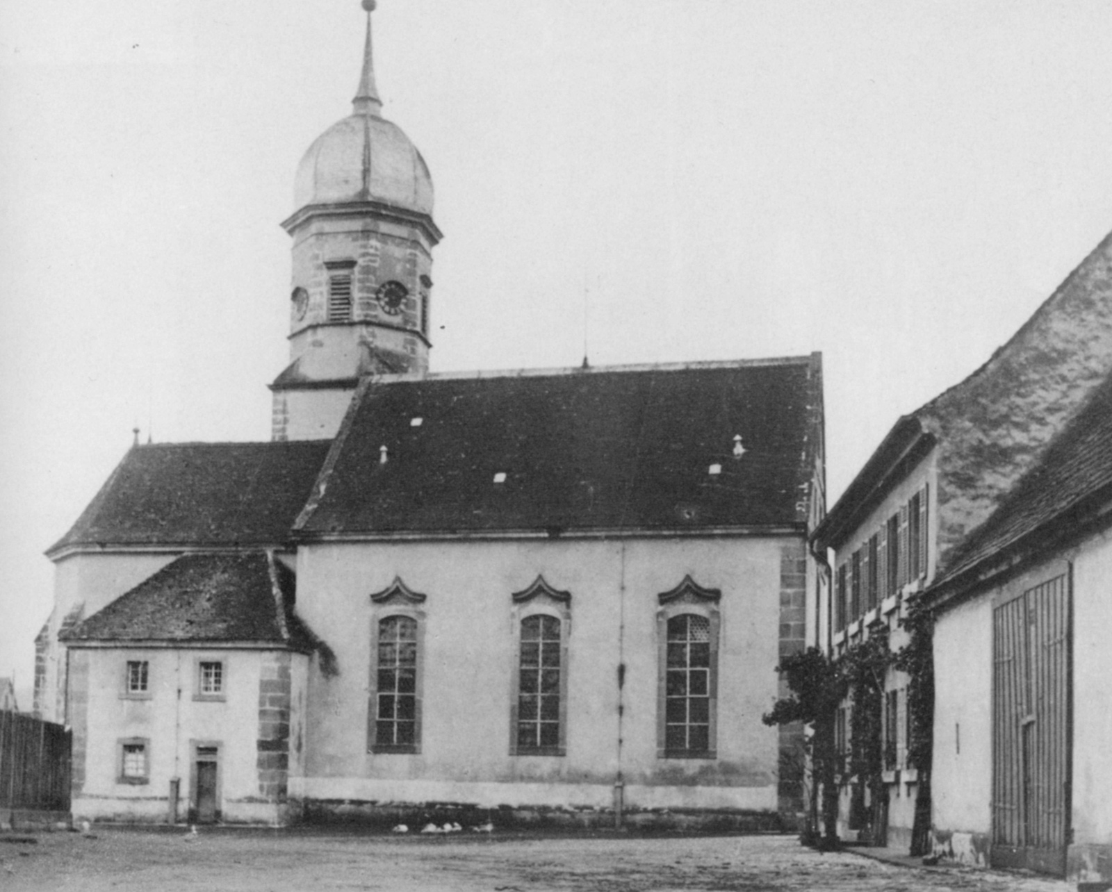 Martinskirche in Heilbronn-Sontheim um 1900, vor dem Umbau von 1904